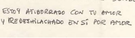 Manuscrito de Luis Alberto Spinetta de la letra de la canción "Estoy atiborrado de tu amor", escrito en 1986. Documento exhibido en la muestra "Los Libros de la Buena Memoria", Biblioteca Nacional, octubre/diciembre 2012.